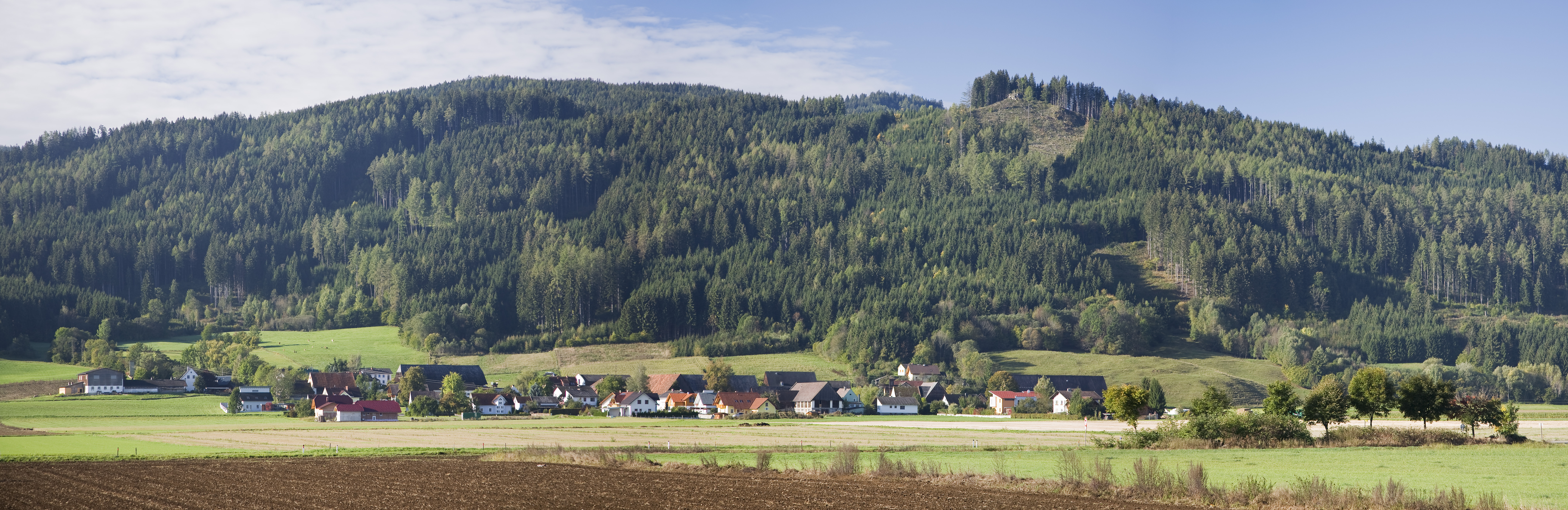 Baierdorf von Norden mit Jahnstein (974m) im Hintergrund.